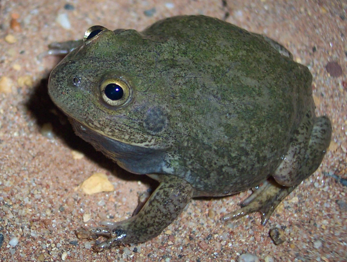 Cyclorana platycephala